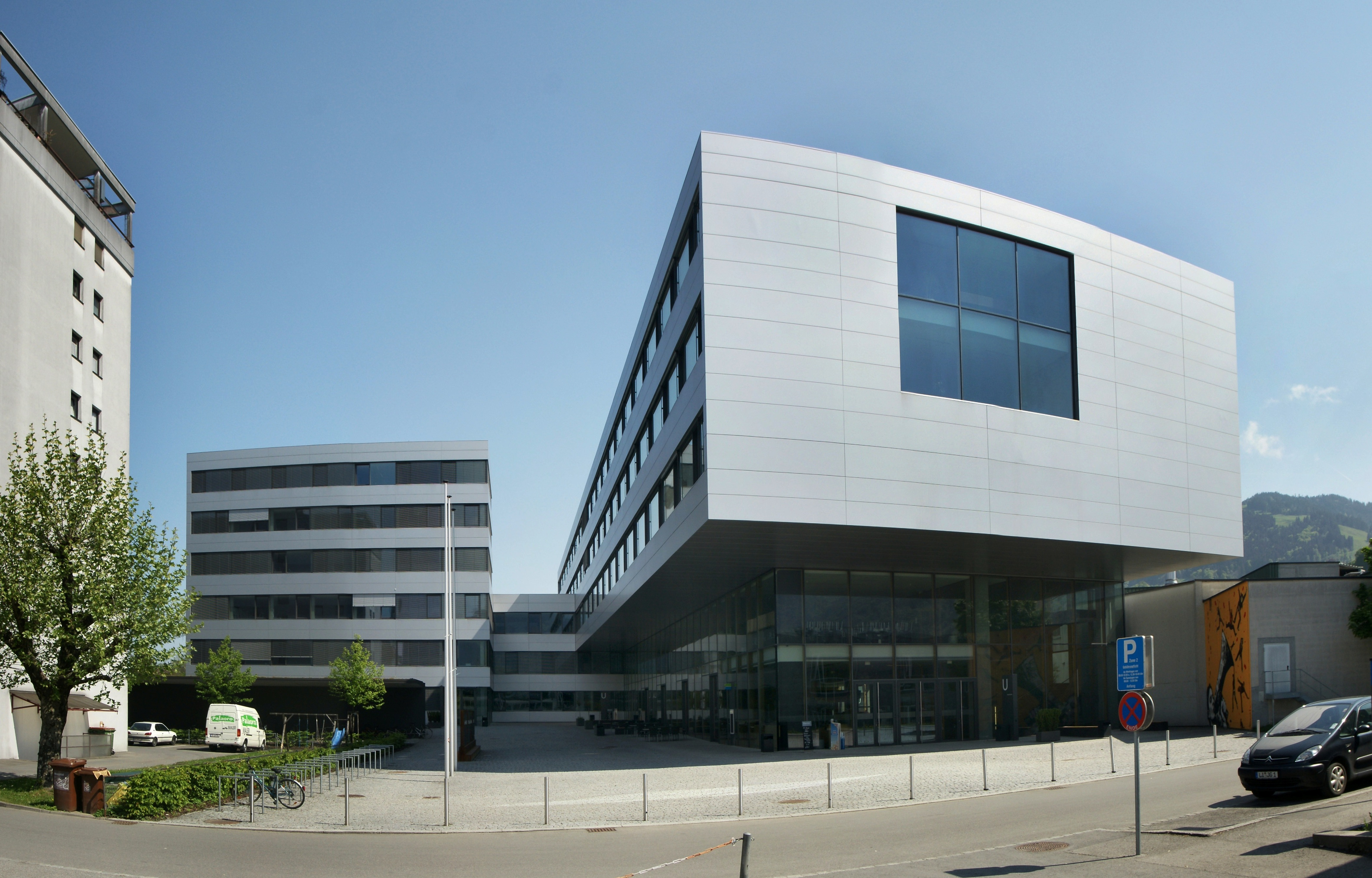 Fachhochschule FH Vorarlberg im Dornbirner Bezirk Markt. 2005 erbaut von walser + werle architekten zt gmbh.